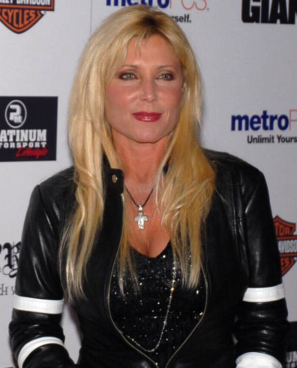 Actress Pamela Bach